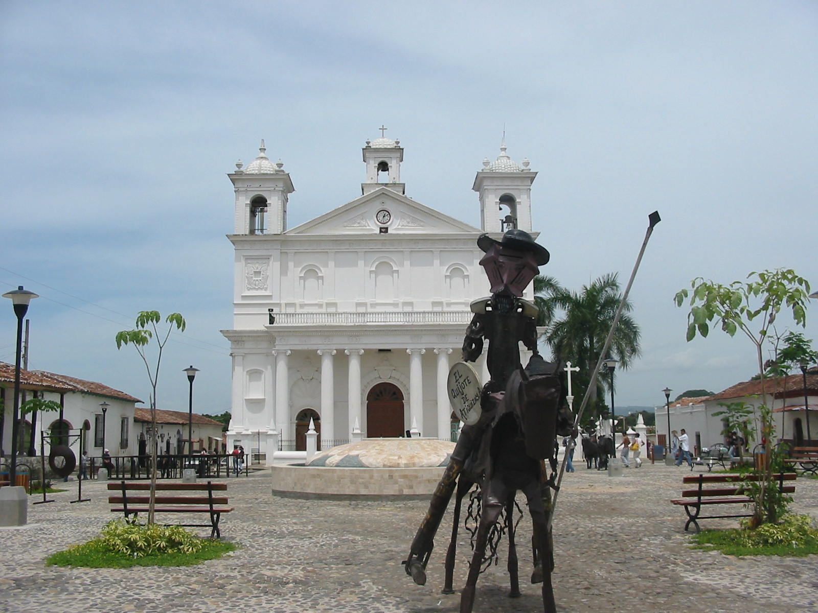 Si los perros ladran es porque andamos... los caninos de Suchitoto amanecieron aullando ante la triste figura del noble Hidalgo. Suchitoto donde todo puede pasar.